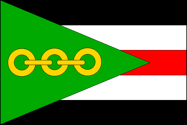 vlajka obce Únanov